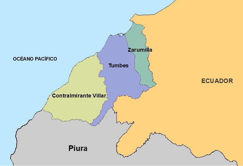 Mapa provincias del departamento de Tumbes, Perú